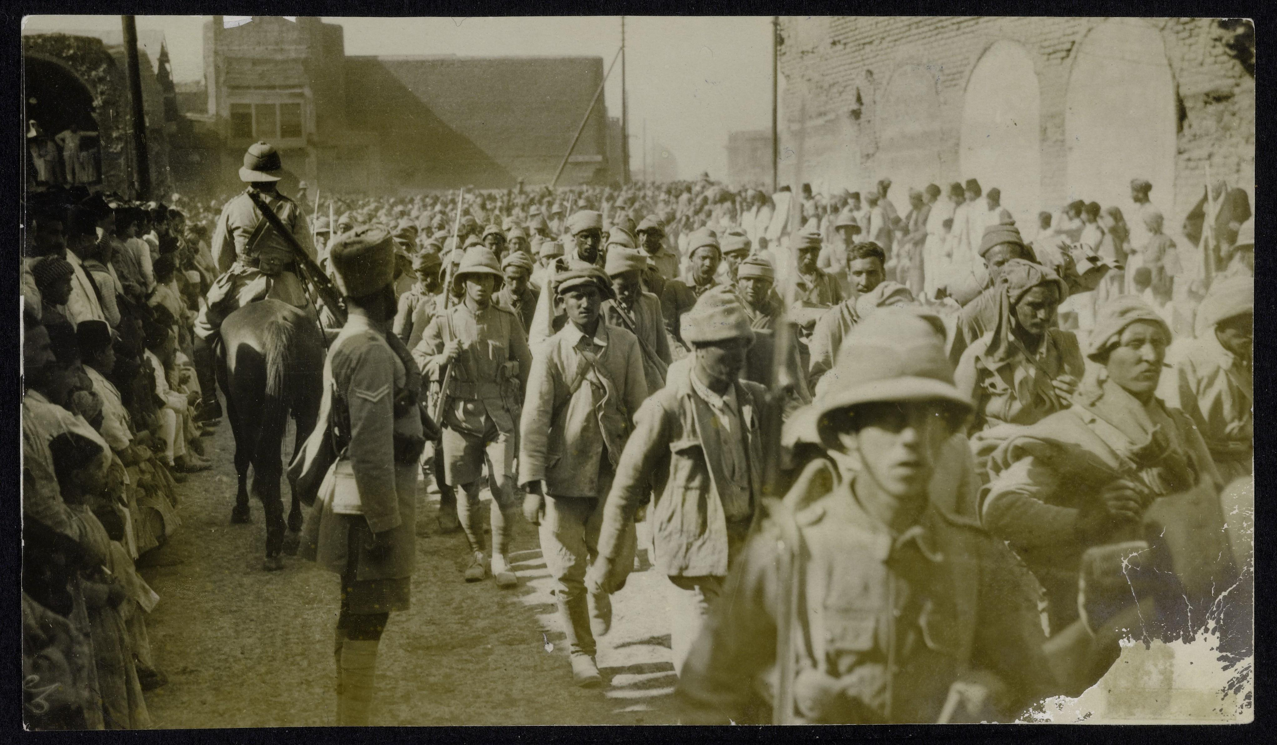 Collectie / Archief : Fotocollectie Eerste Wereldoorlog Reportage / Serie : With the troops in Mesopotamia Beschrijving : Turk prisoners passing through New Street, Baghdad Annotatie : Bij de troepen in Mesopotamië. Turkse krijgsgevangenen in Baghdad Datum : {1914-1918} Locatie : Bagdad, Irak, Mesopotamië Trefwoorden : eerste wereldoorlog, krijgsgevangenen, soldaten, steden Fotograaf : Associated Illustration Agencies# Auteursrechthebbende : Public Domain logo Materiaalsoort : Foto (zwart/wit) Nummer archiefinventaris : bekijk toegang 2.24.09 Bestanddeelnummer : 158-0830